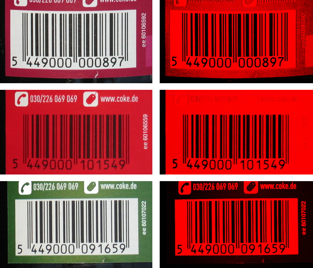 GTIN-Barcodes auf Cola-Flaschen, links Foto, rechts was der rote Laser des Barcodescanner sehen würde